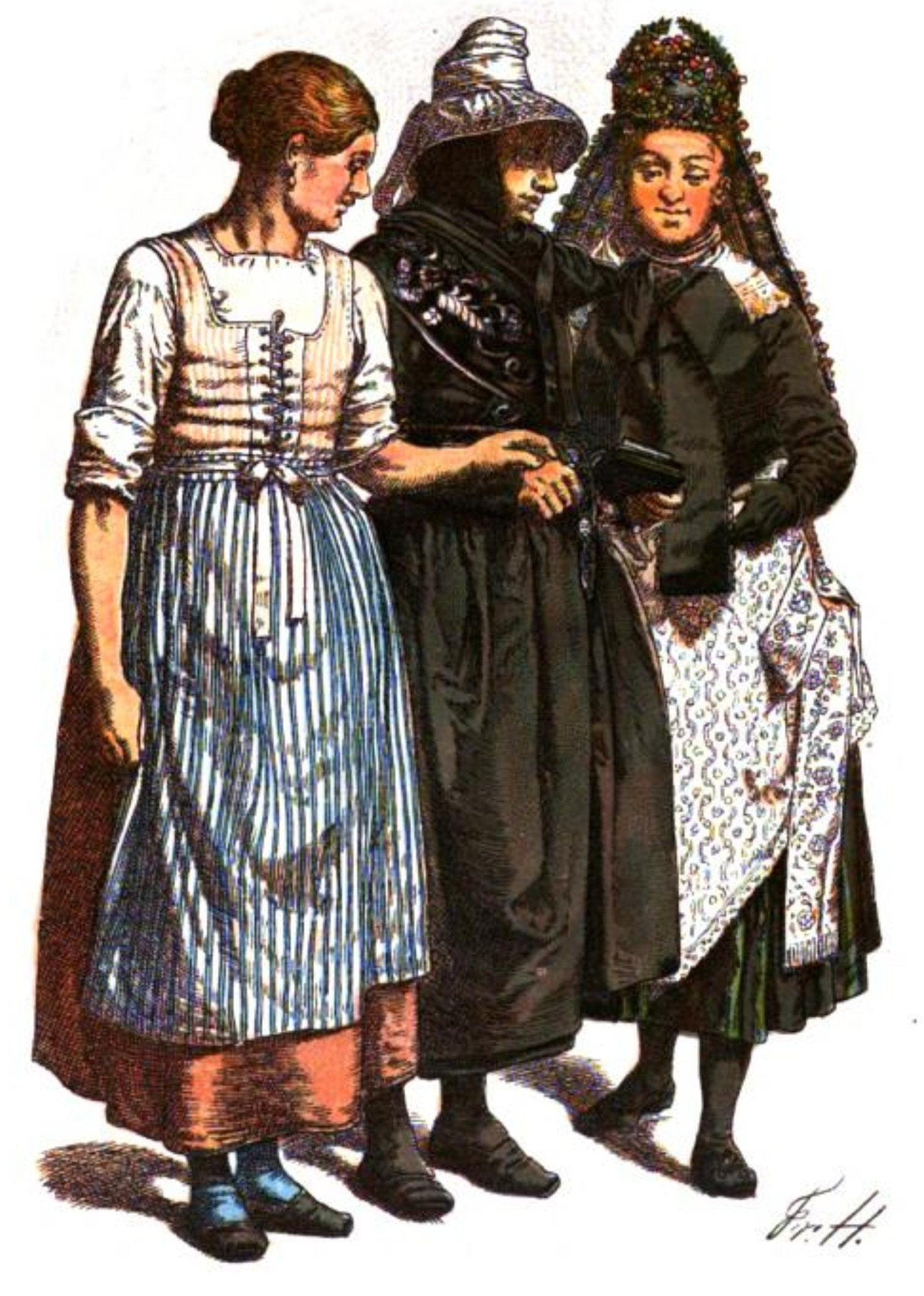 Friedrich Hottenroth: Nassauisches Trachtenbuch Tafel 8: Bäuerinnen aus dem nordöstlichem Taunus (Hasselborn) Haus- Komminionsanzug und Braut